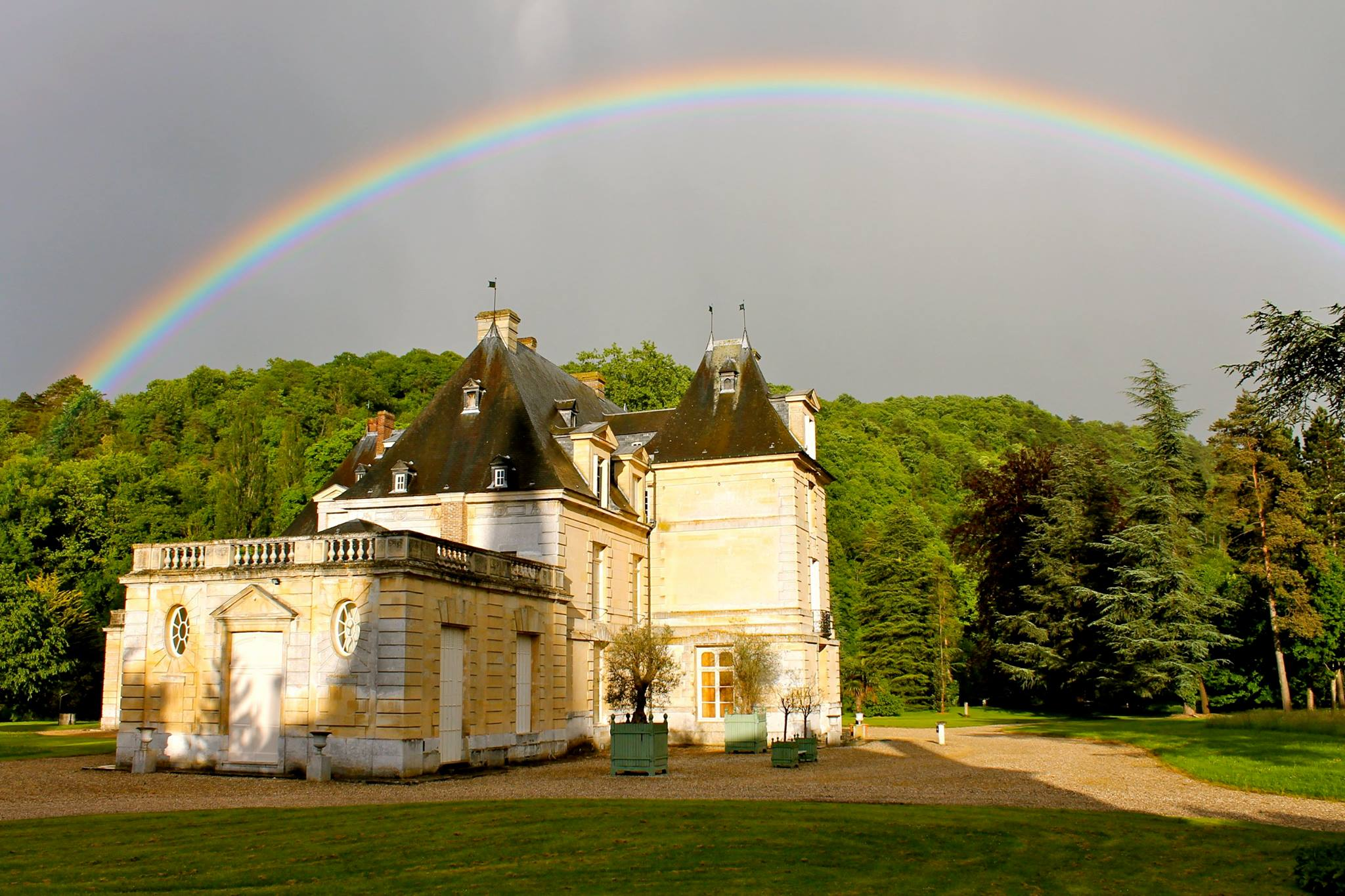 Magnifique arc-en-ciel au-dessus du château d'Acquigny